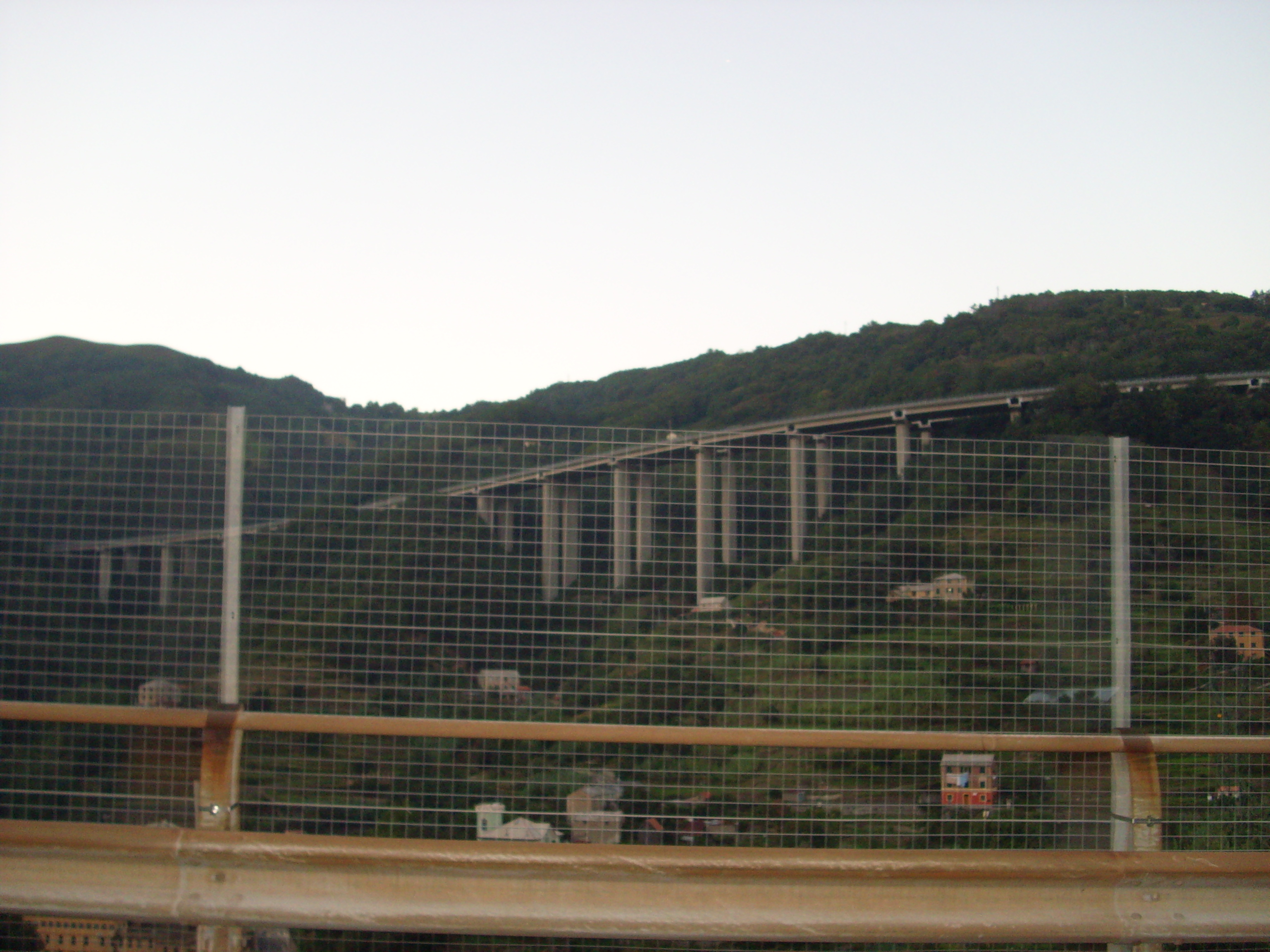 Uno dei viadotti dell'autostrada A26, sito nel territorio della provincia di Genova, che consentono la discesa dal passo del turchino verso la costa ligure